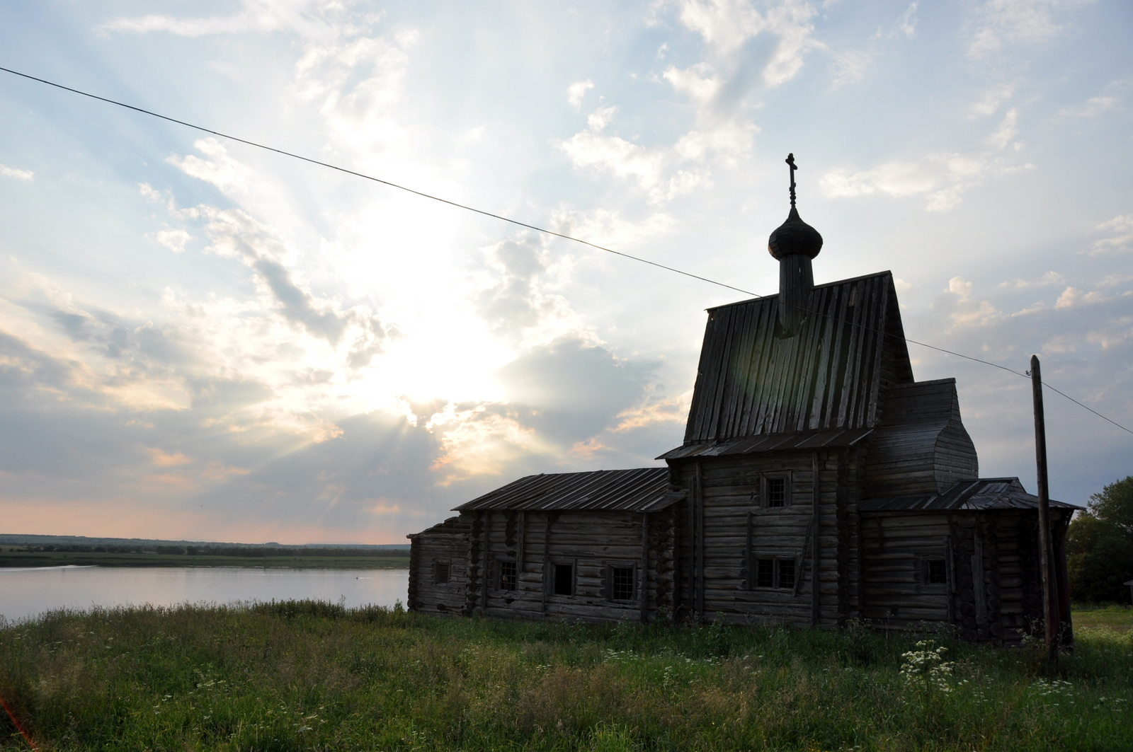 Церковь Василия Блаженного в Чухчерьме. Вид с юга.